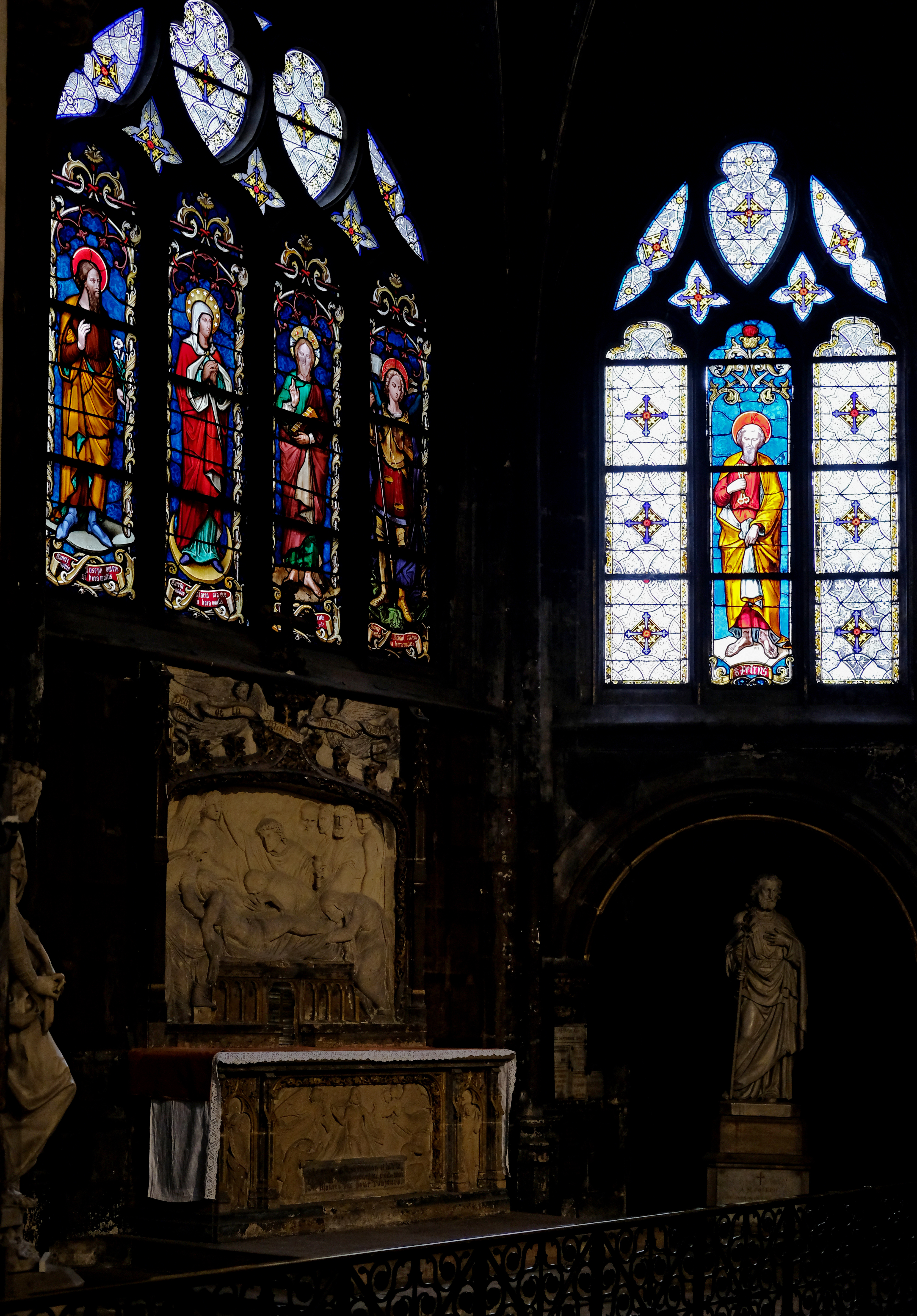 Église Saint-Germain-l'Auxerrois (chapelle de la Bonne Mort) - Paris Ier